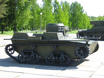 Summary Т-38. Плавающий танк